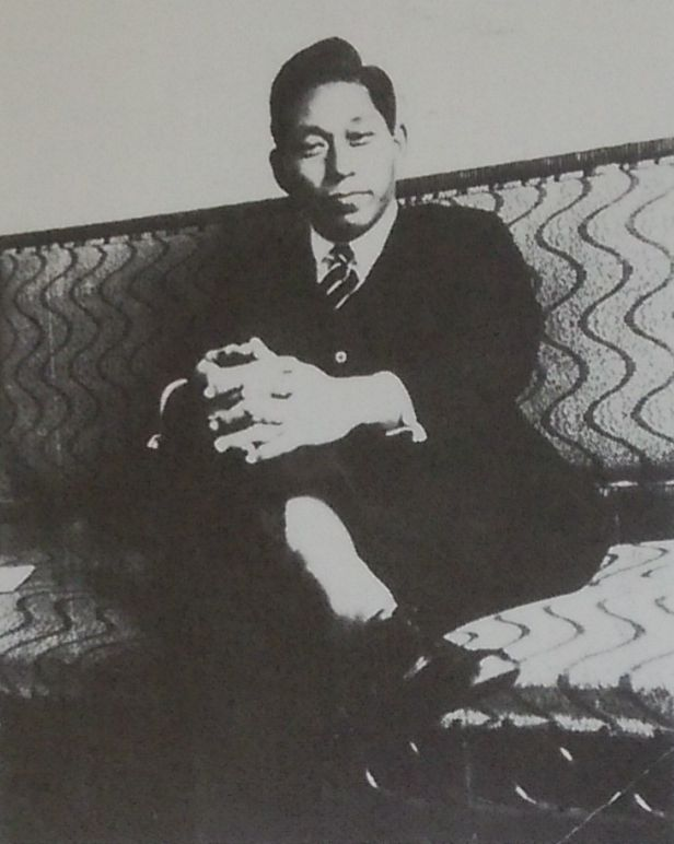 松前重義（逓信省工務局長時代）